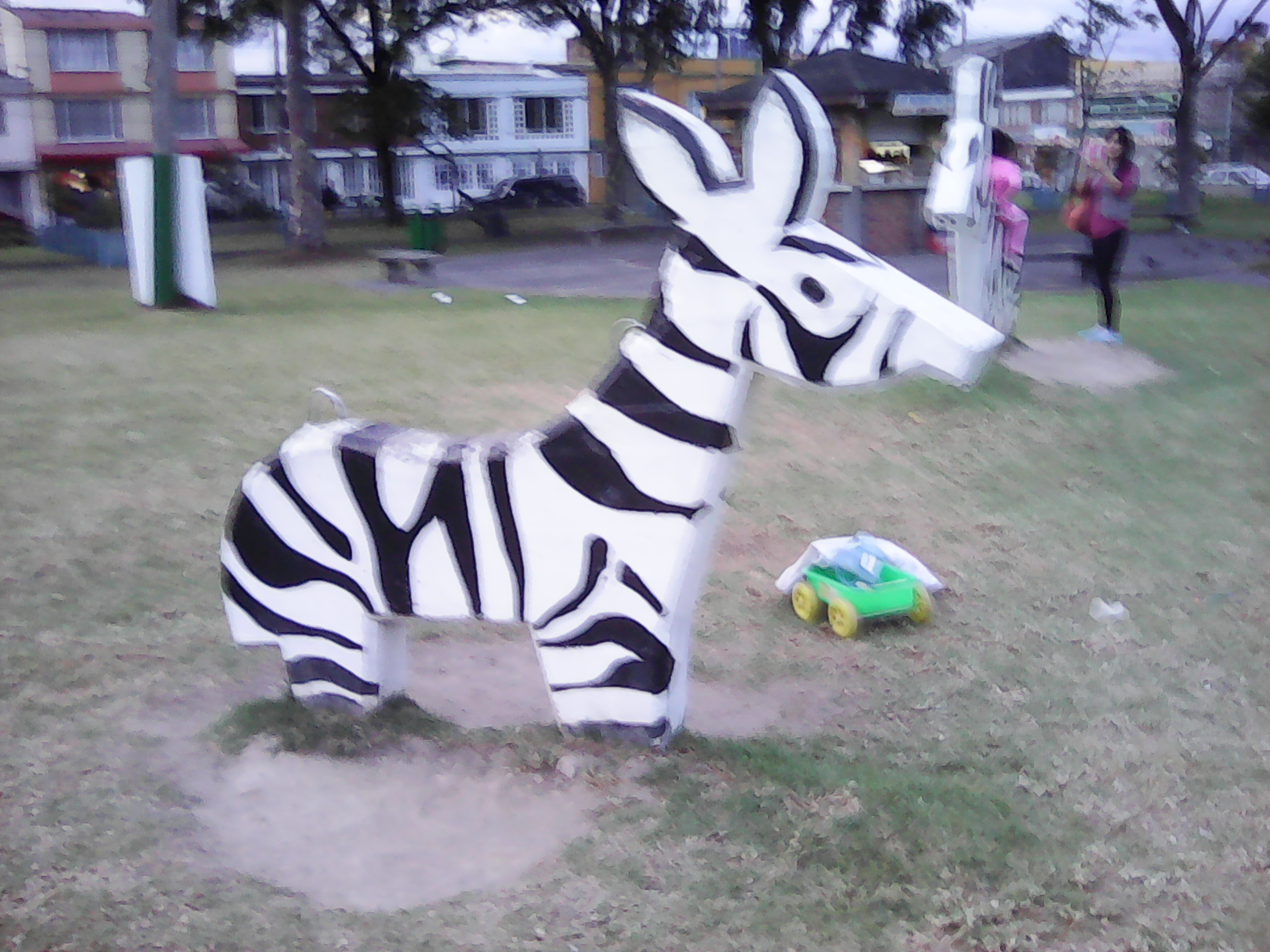 Cebra Parque Ciudad Montes